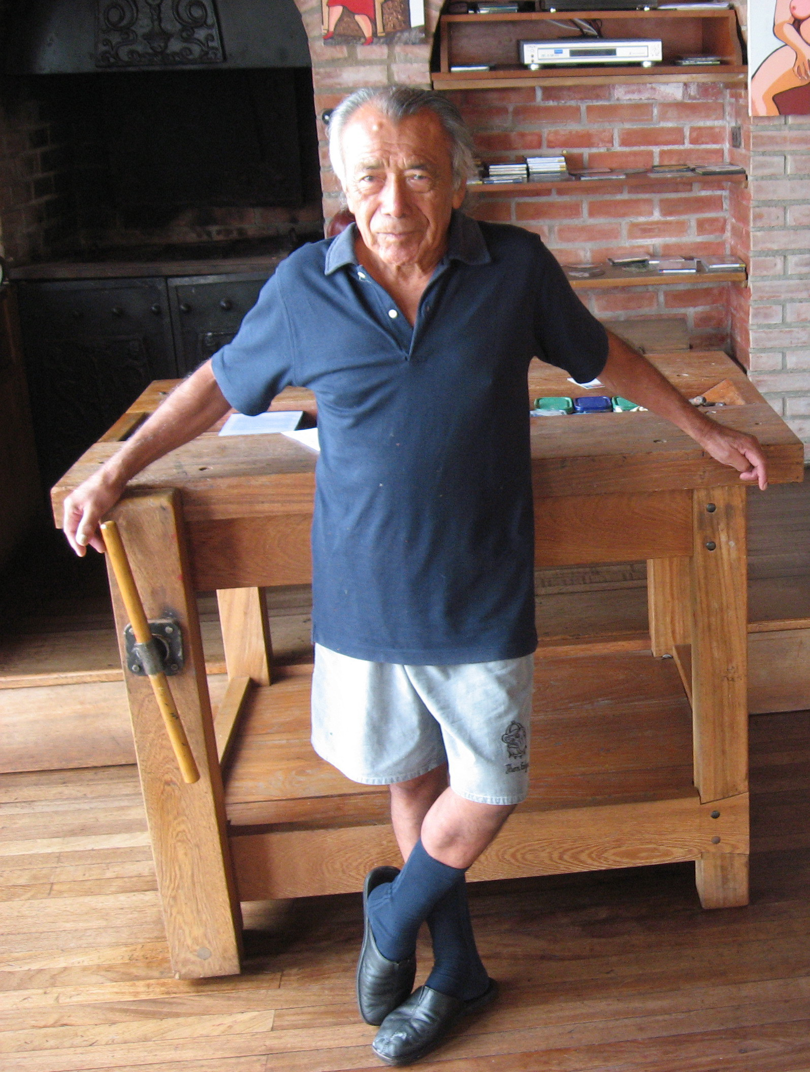 Víctor Delfín en 2007